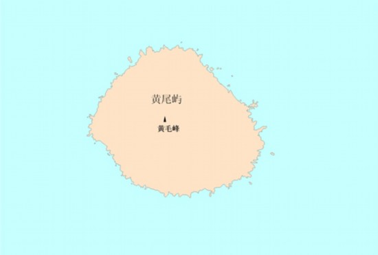 黄尾屿山川河岳地形图